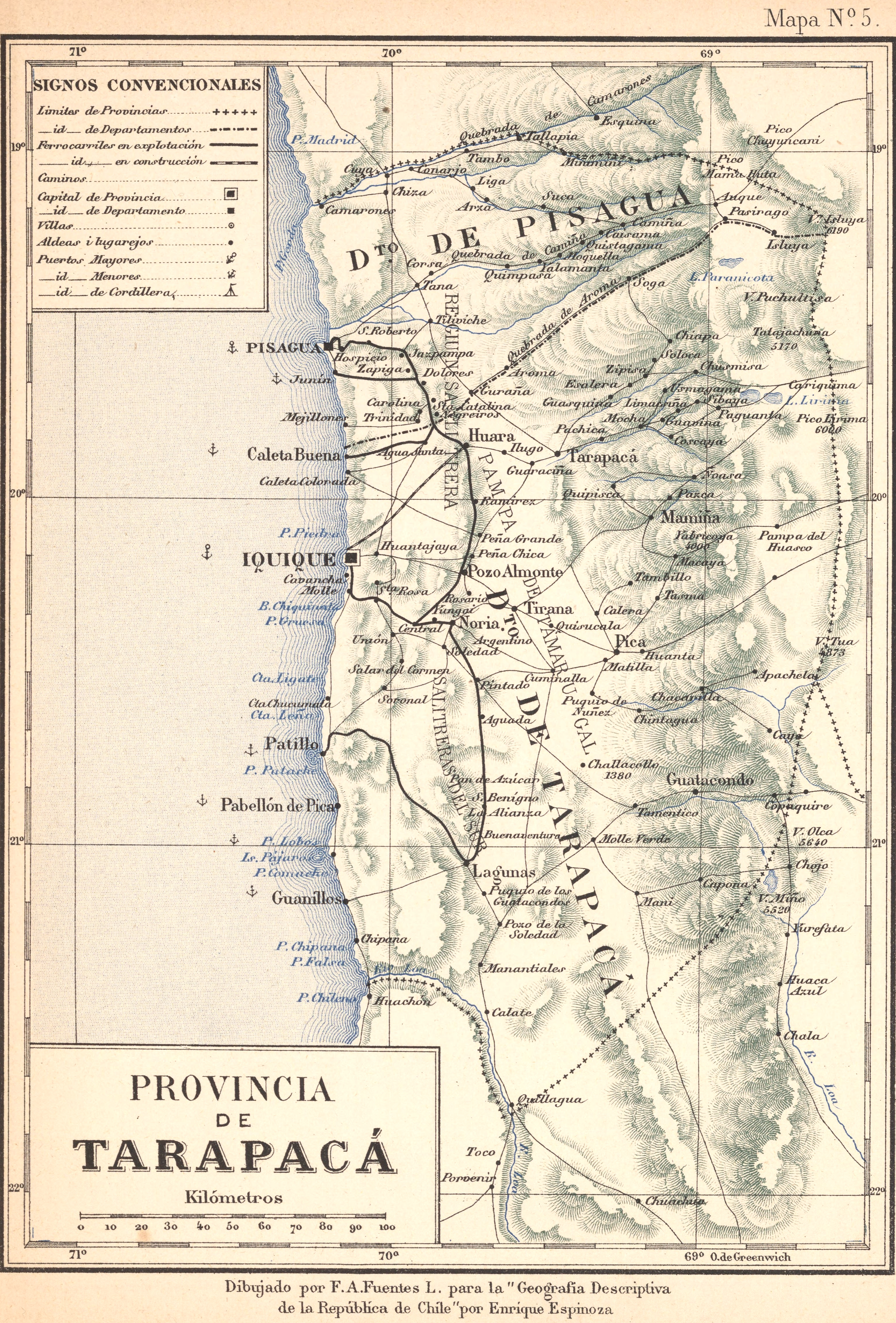 Mapa de la antigua Provincia de Tarapacá, antecesora de la actual Provincia de Iquique, I Región de Tarapacá (Chile), hacia 1895.